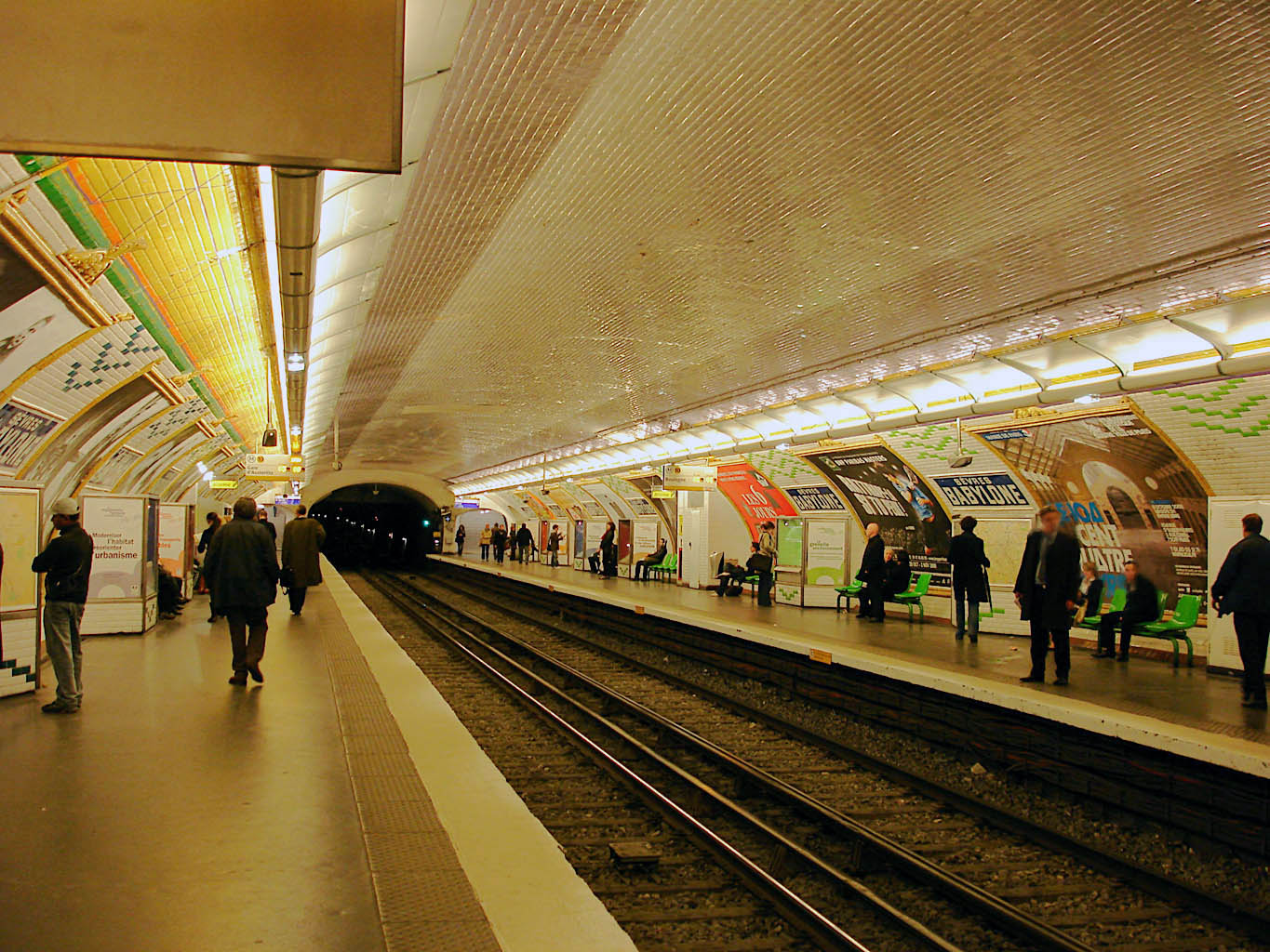 Station Sèvres - Babylone de la ligne 10 du métro de Paris, France.